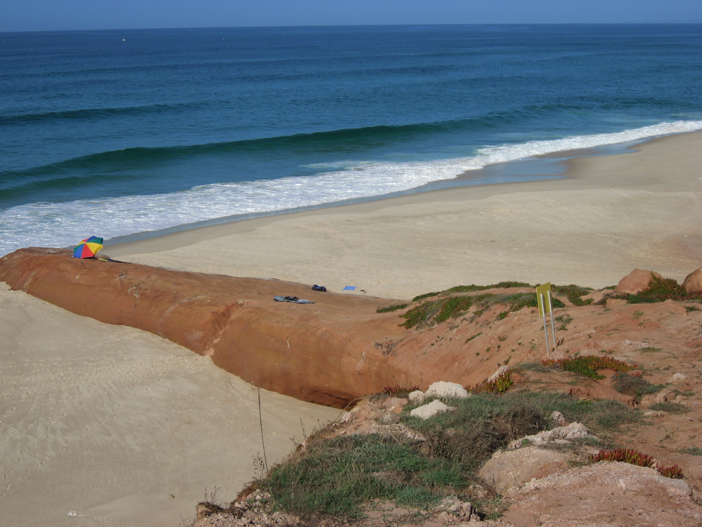 Alamgreira